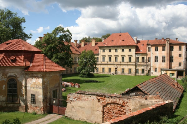 Areál zámku v Plasích, který před přestavbou sloužil jako prelatura bývalého cisterciáckého kláštera